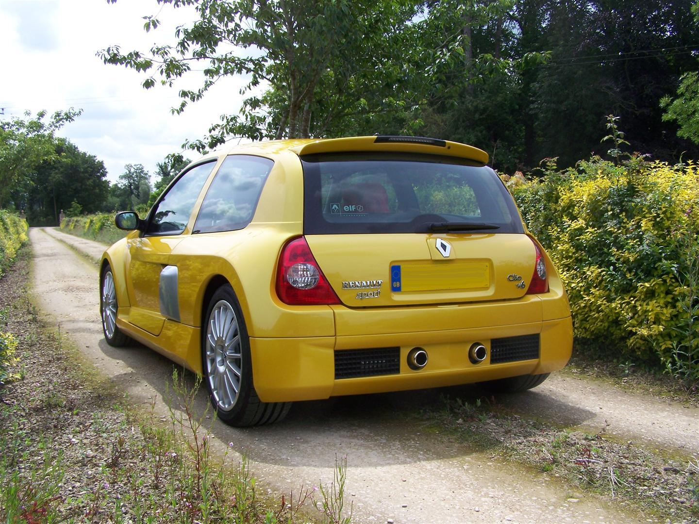 2006 RenaultSport Clio V6 255